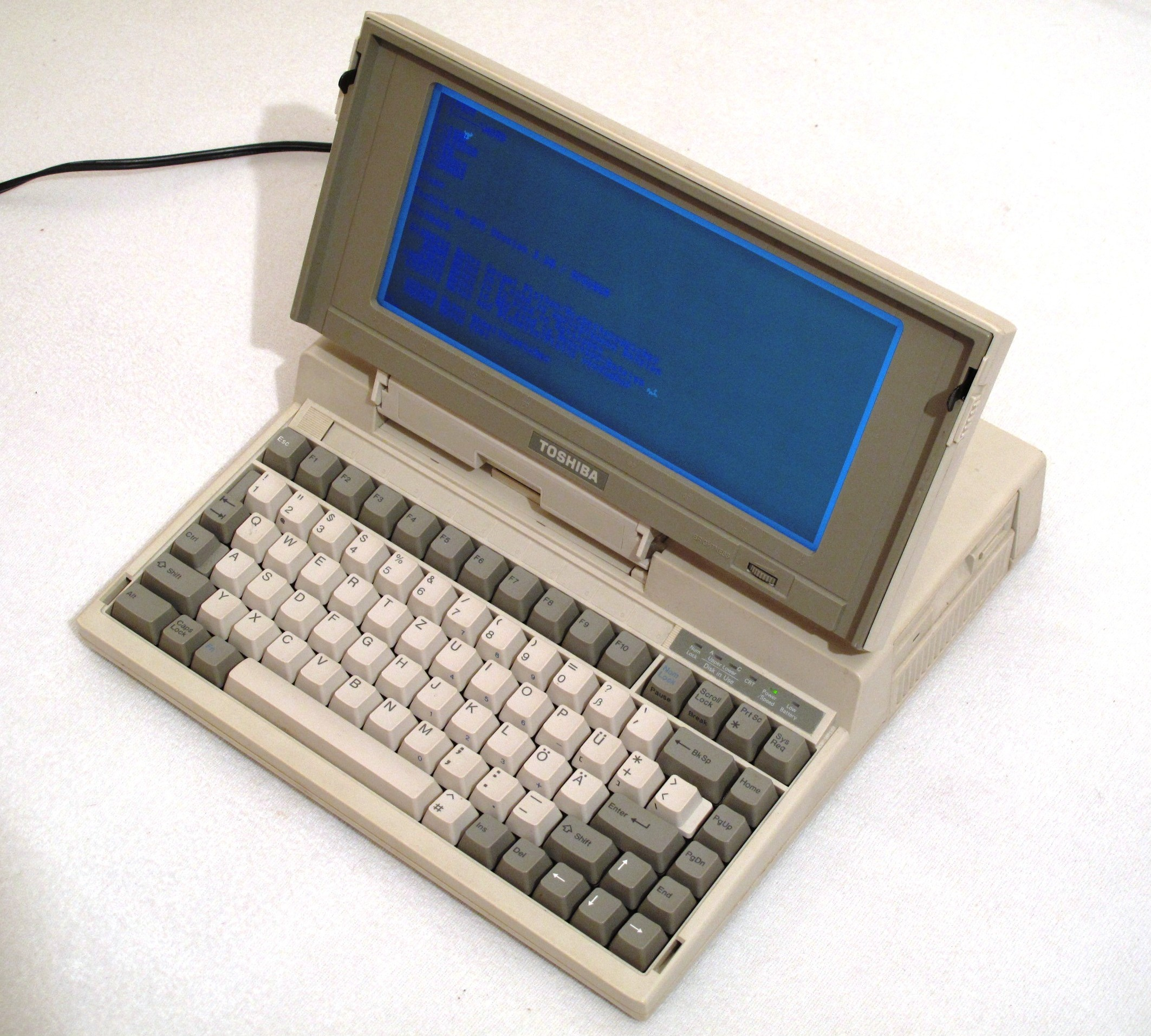 Toshiba T1200 Laptop